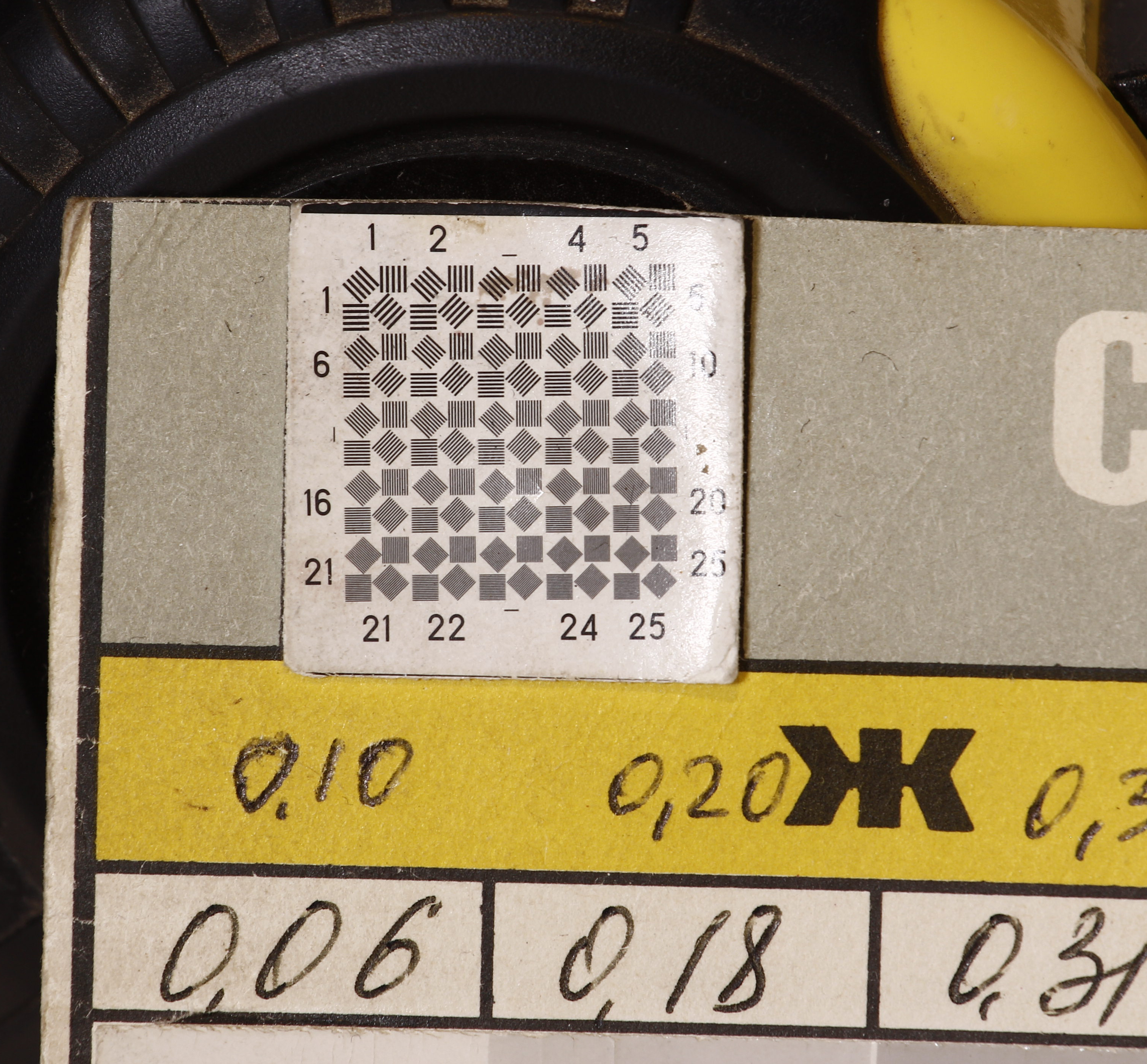 Fréquence spatiale